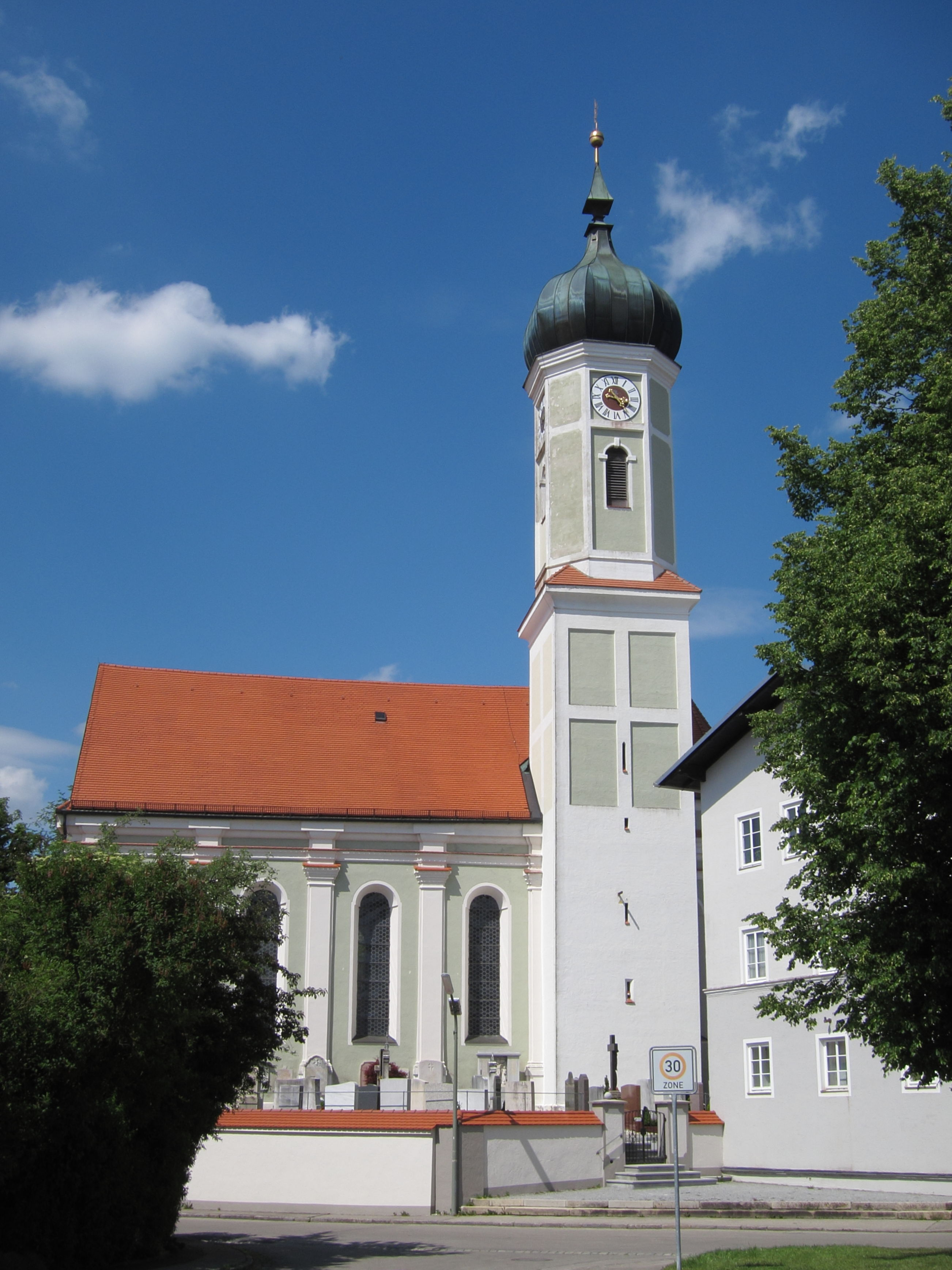 Anton-Grandauer-Str. 5; katholische Pfarrkirche St. Martin, einheitlicher Barockbau, wohl von Johann Georg Ettenhofer; mit Ausstattung; Friedhofskapelle, Anfang 18. Jahrhundert; mit Ausstattung; Friedhofsummauerung, 18./19. Jahrhundert.